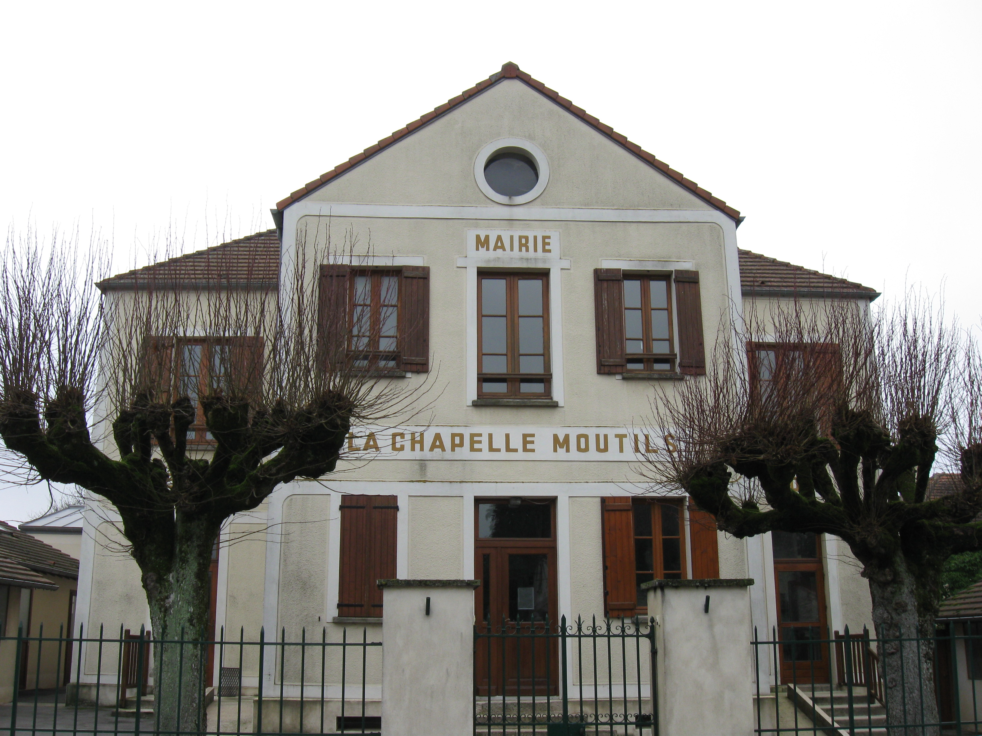 Mairie de La Chapelle-Moutils (département de la Seine et Marne, région Île-de-France).